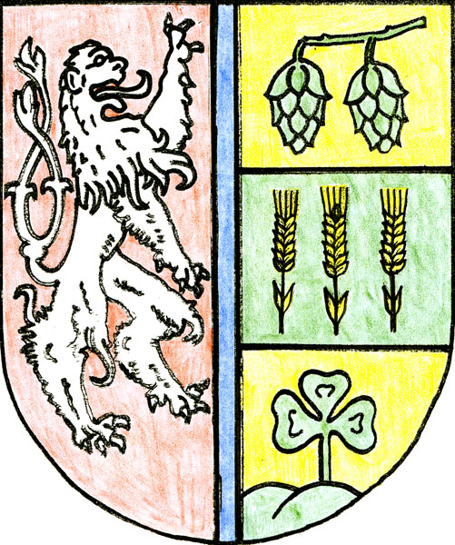 Znak obce Libořice